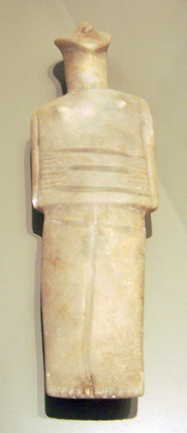 Weibliches Marmoridol der Kykladenkultur, Nachkanonische Art, 2300/2000 v. Chr., gefunden auf Seriphos, Altes Museum: Antikensammlung Berlin